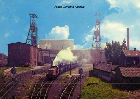 Fosse Gayant à Waziers aujourd'hui disparue.